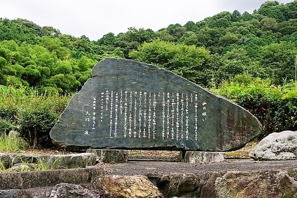 愛媛県西条市 旧市倉ファーム跡に残るモニュメント。創設者の言葉が記載されている。著作権有のため、低解像度のみアップロード